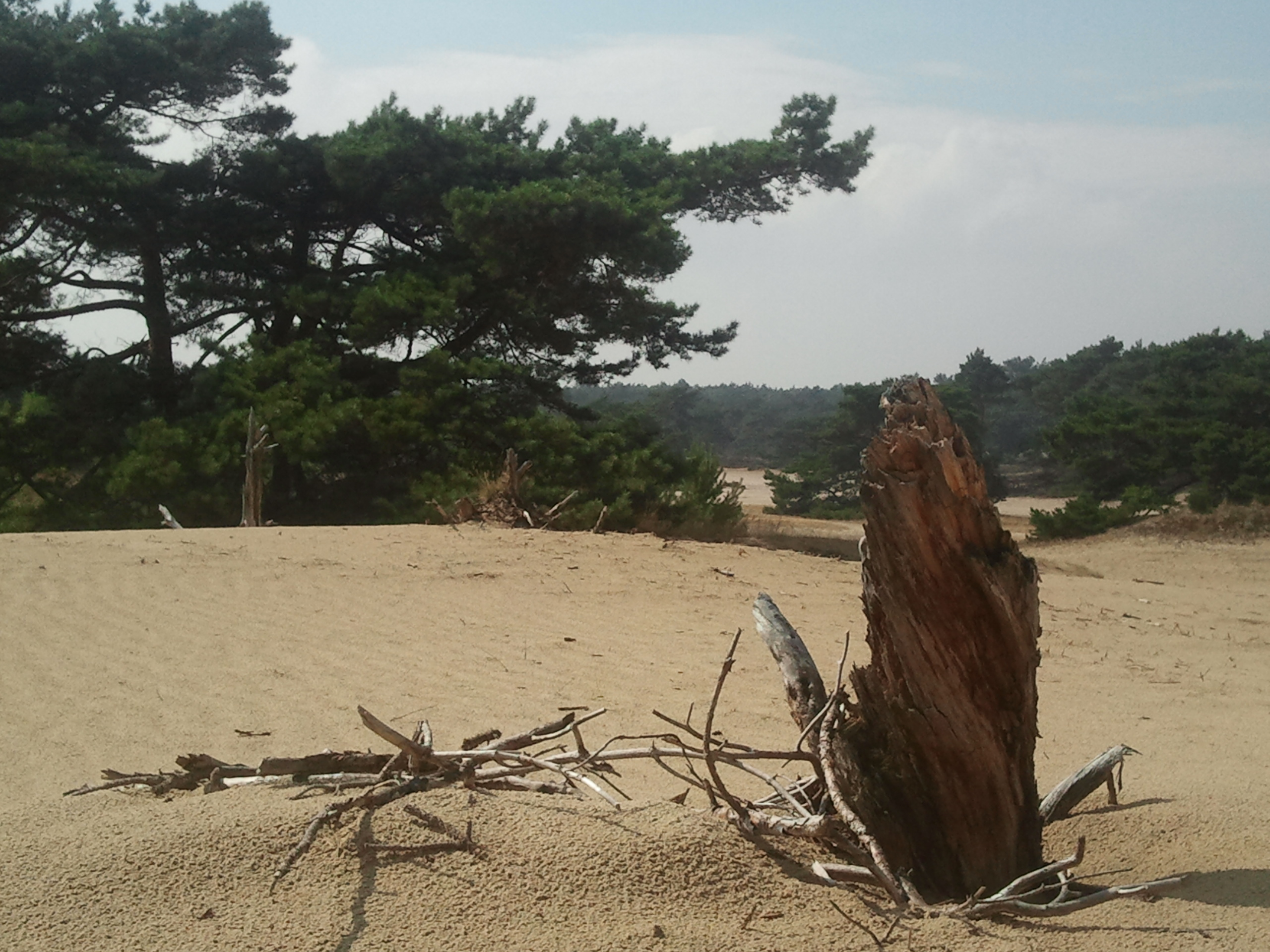 Nedersaksies: Bie t Hulshorsterzaand